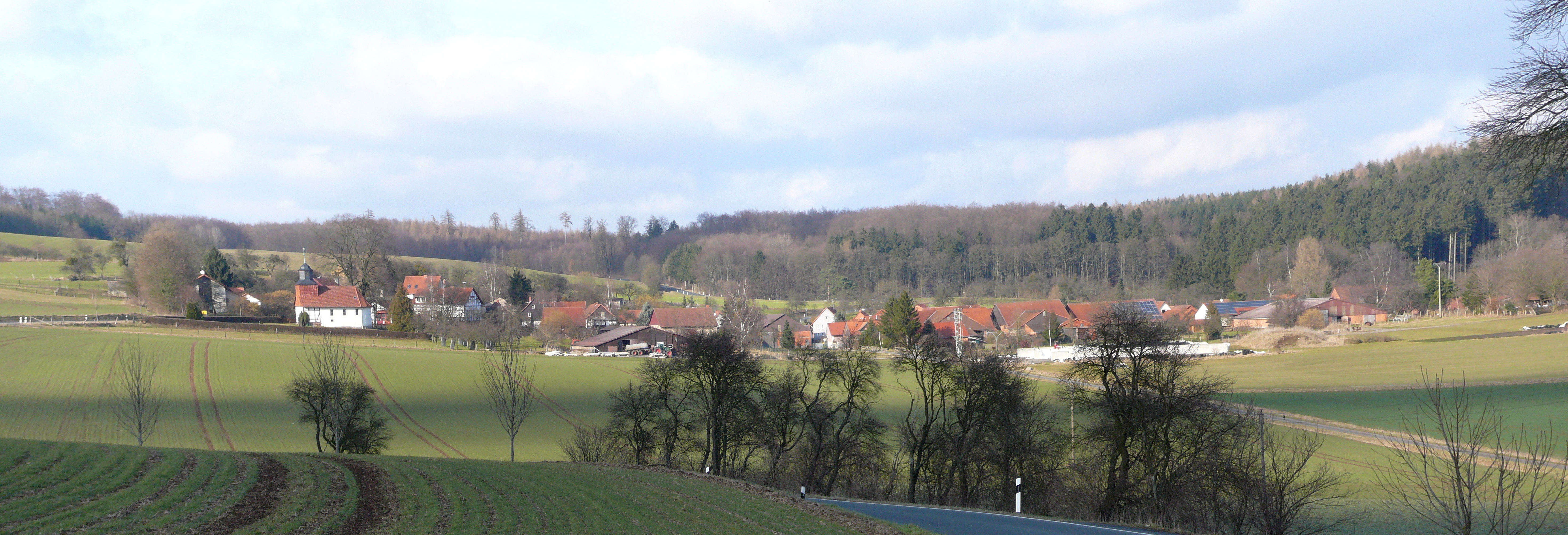 Blick von Südsüdosten auf Ludolfshausen, Gemeinde Friedland, Südniedersachsen